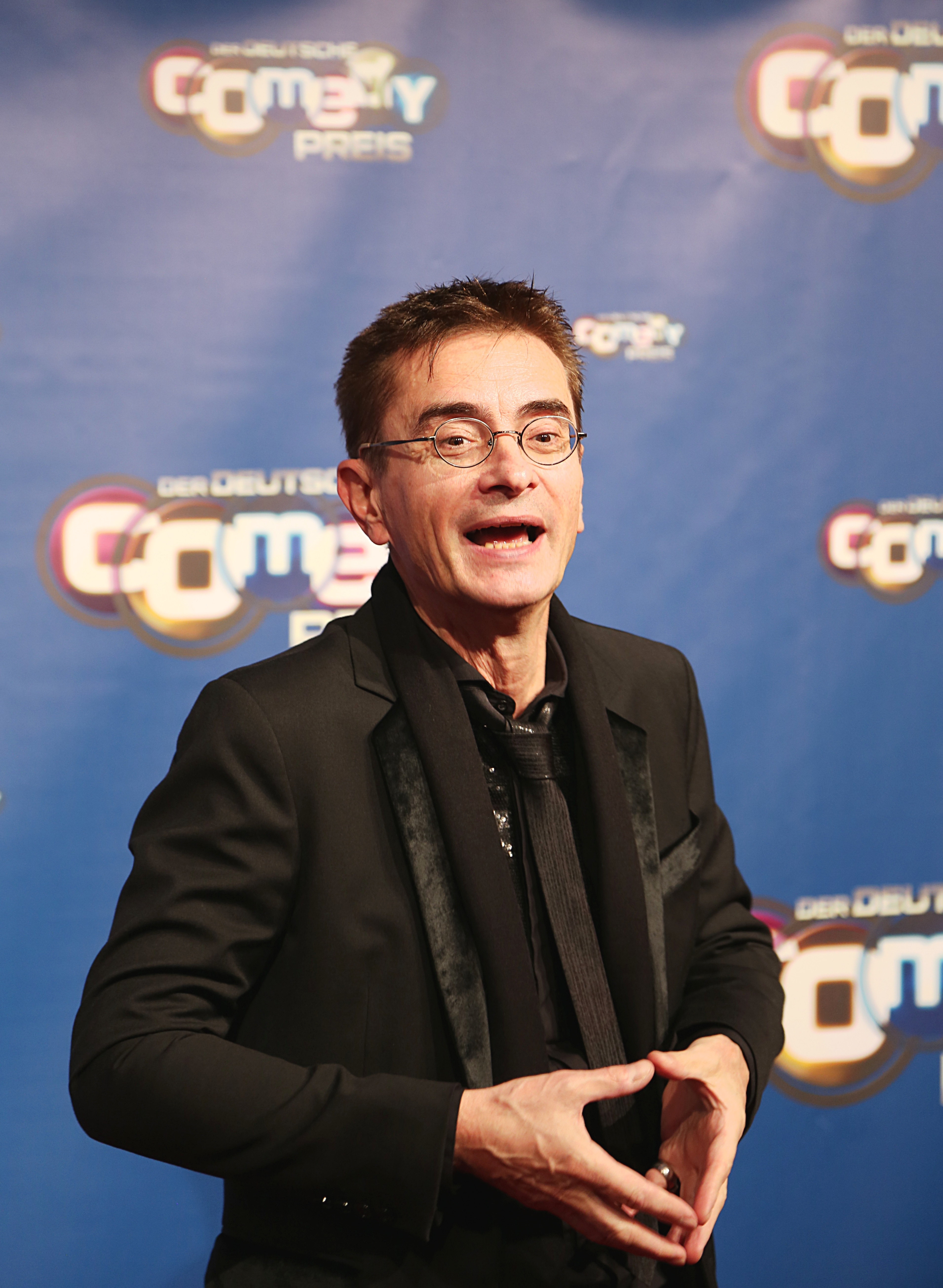 Mathias Richling beim Deutschen Comedypreis 2017.